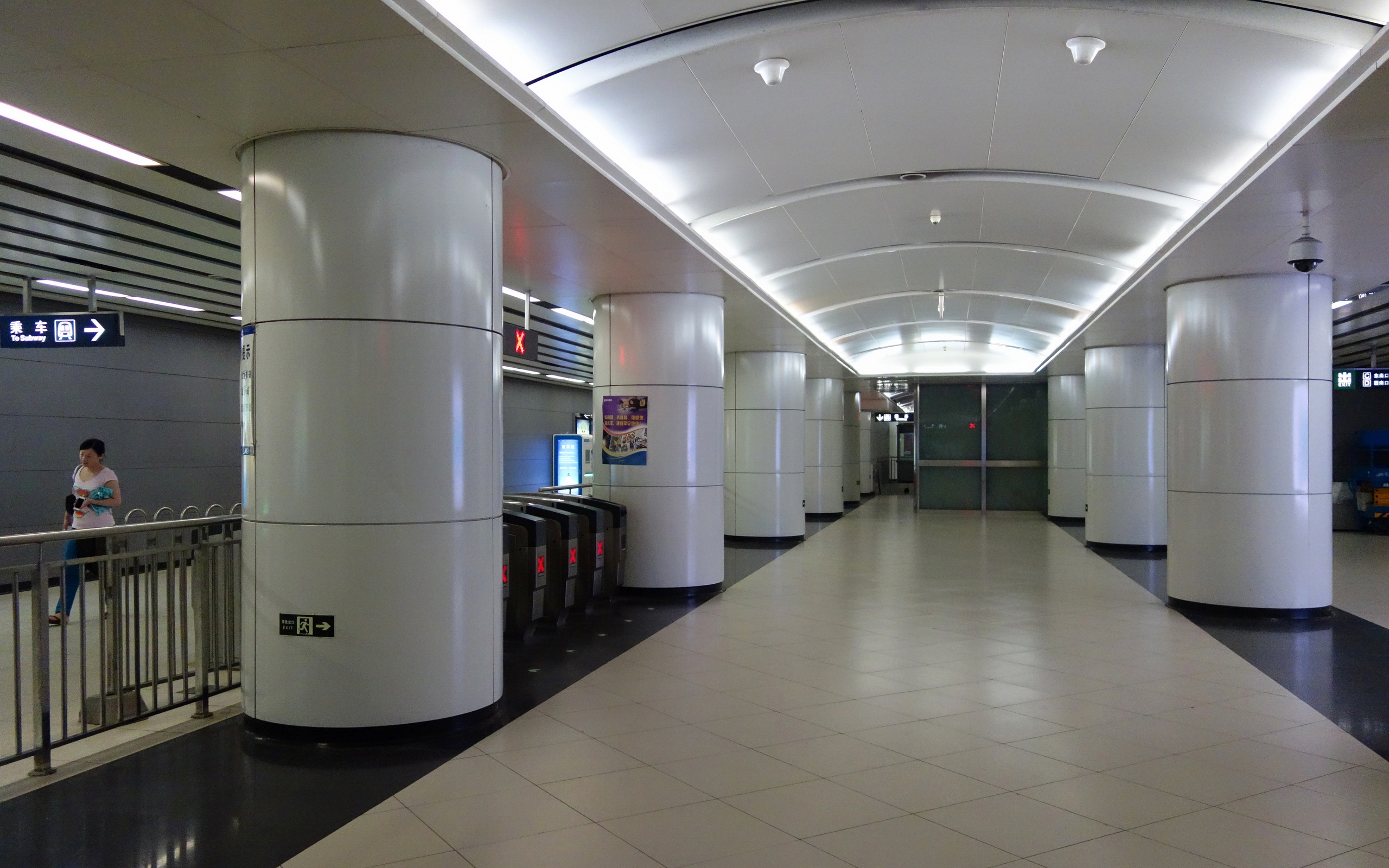 北京地铁10号线站厅